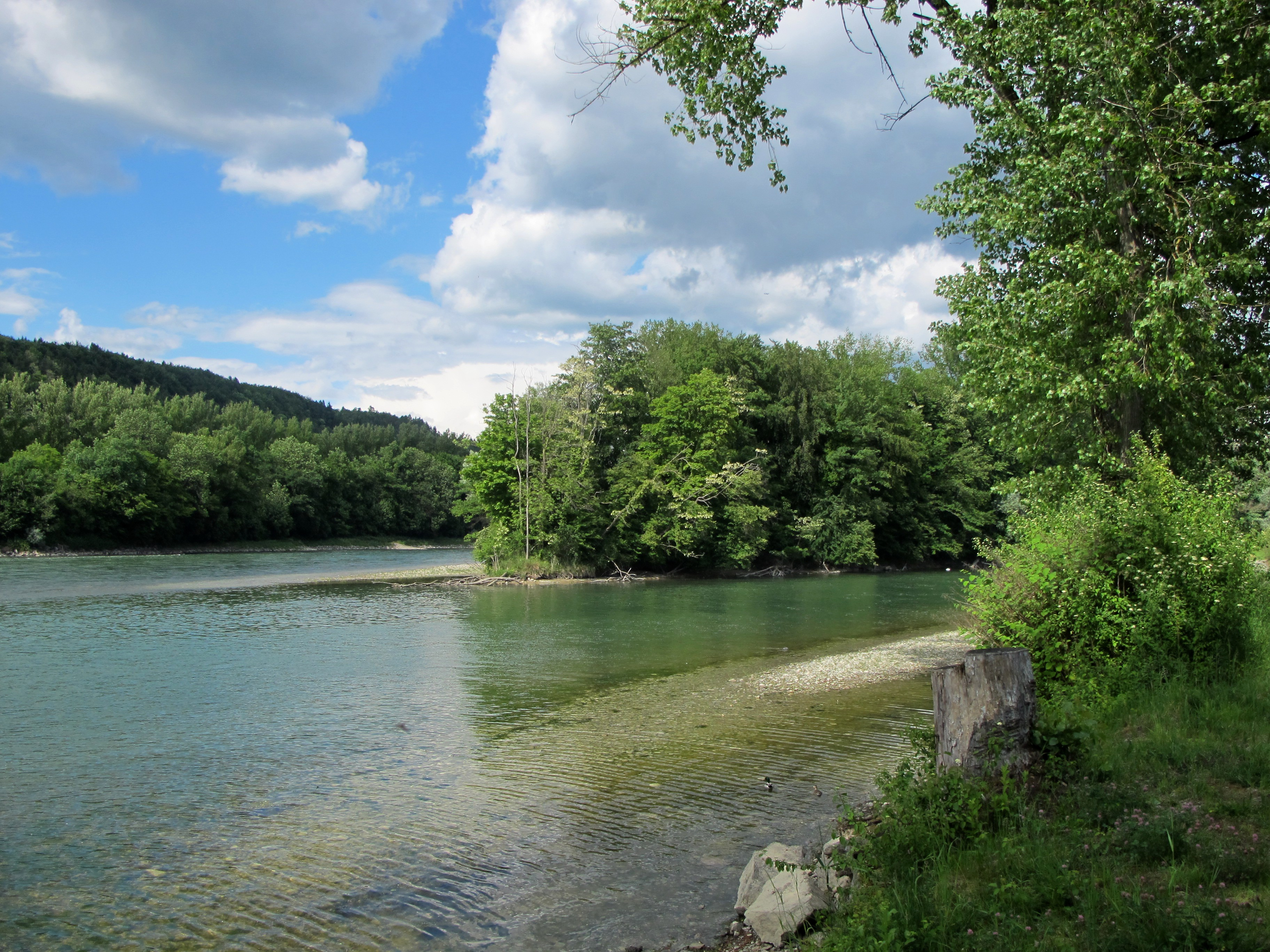 Rhein bei Koblenz aufwärts Richtung Zurzach, Inseli und schöne Ufer mit Biber und Vögel